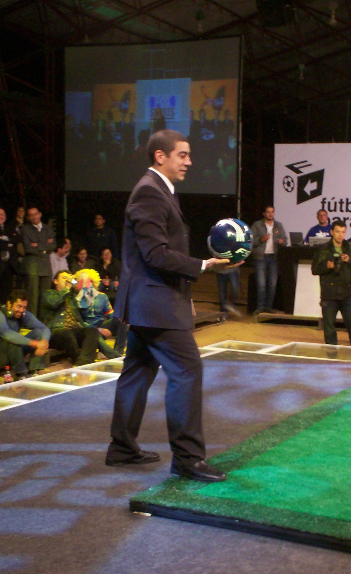 Walter Queijeiro en el lanzamiento de la Copa Universitaria de fútbol tenis en Bogotá.